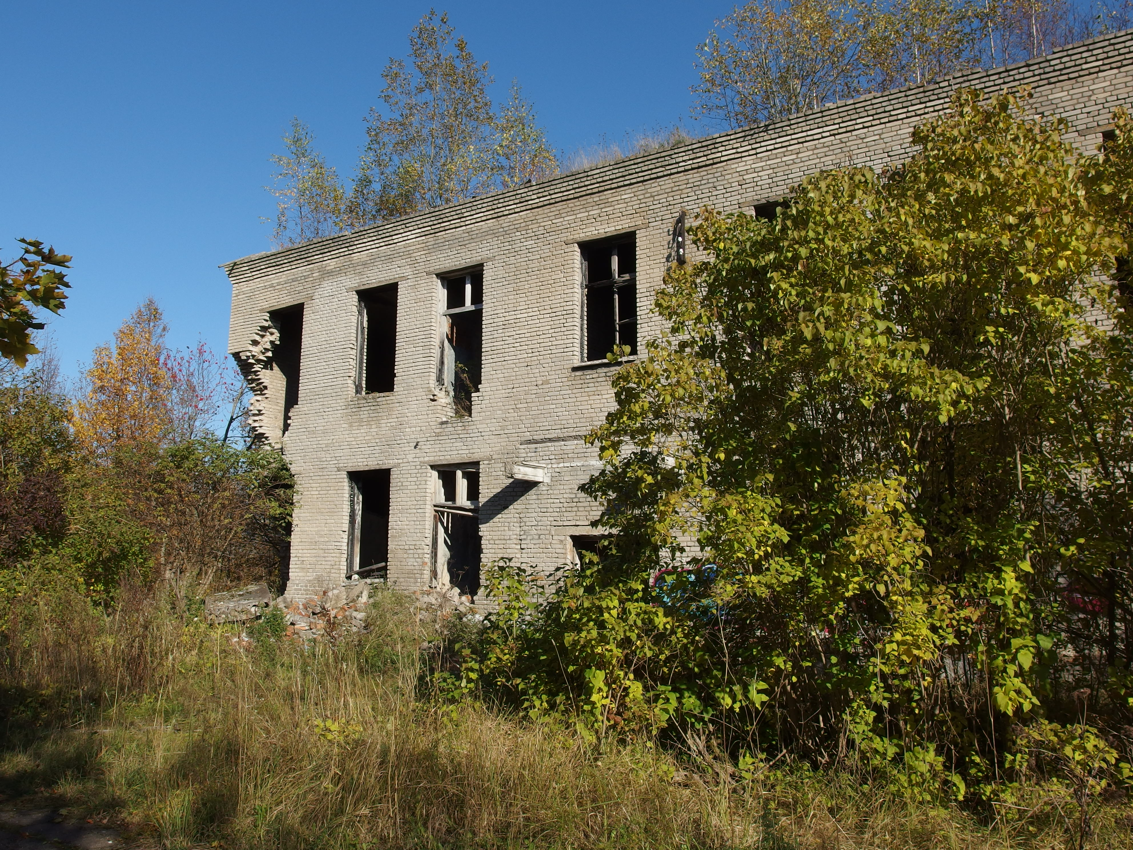 Endine sõjaväebaas Põimas